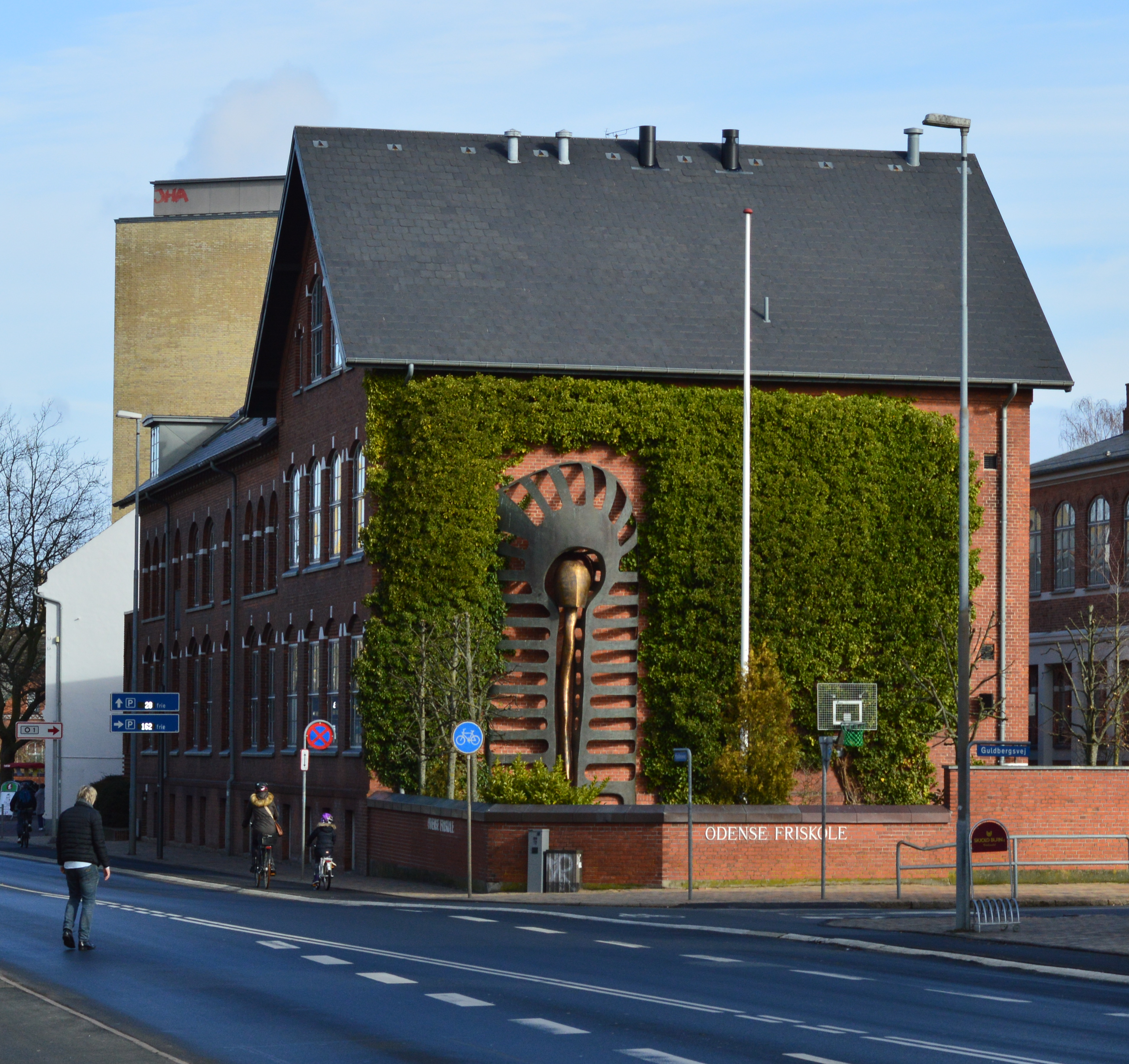 Odense Friskole